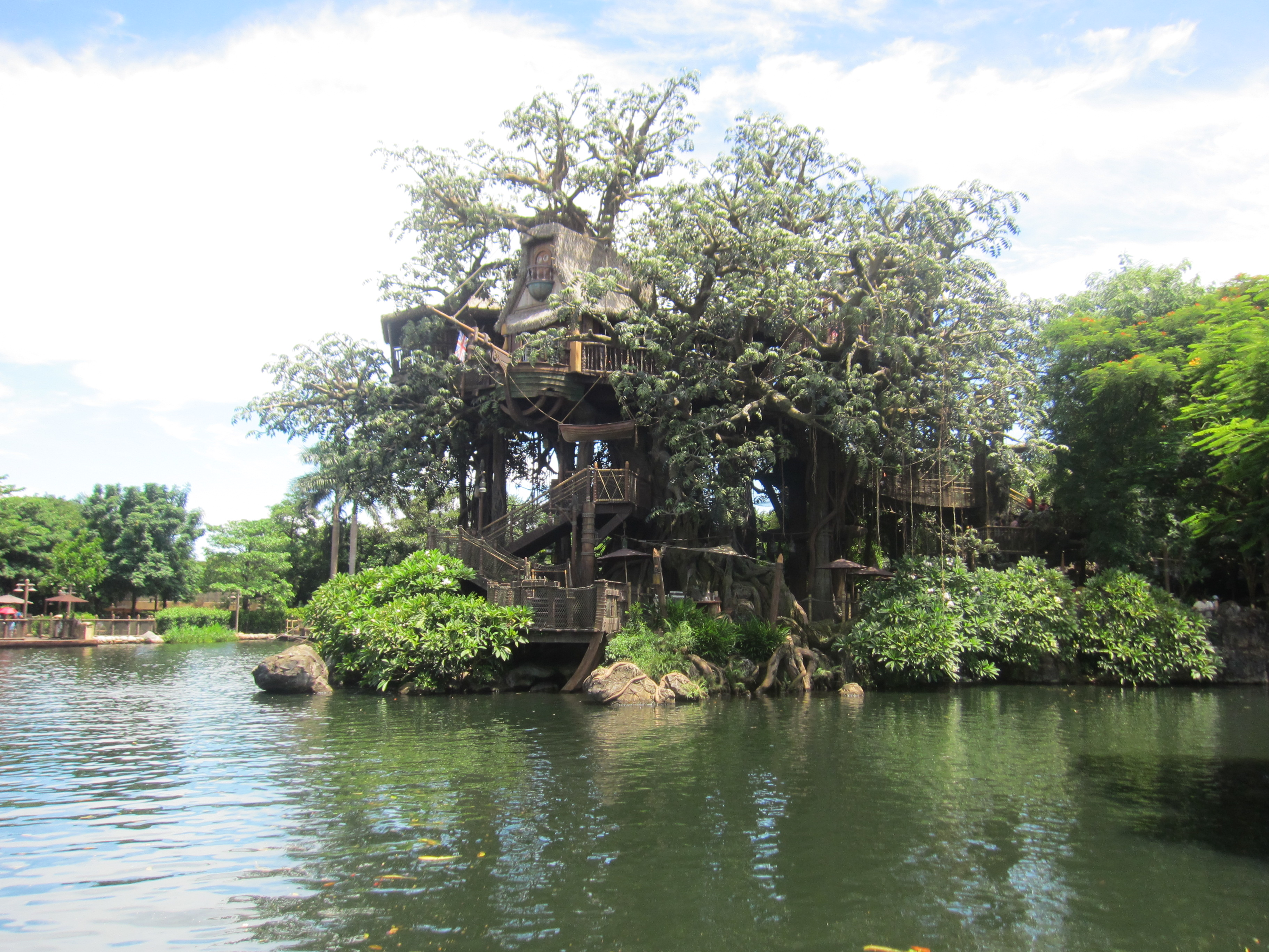 דיסנילנד (הונג קונג)